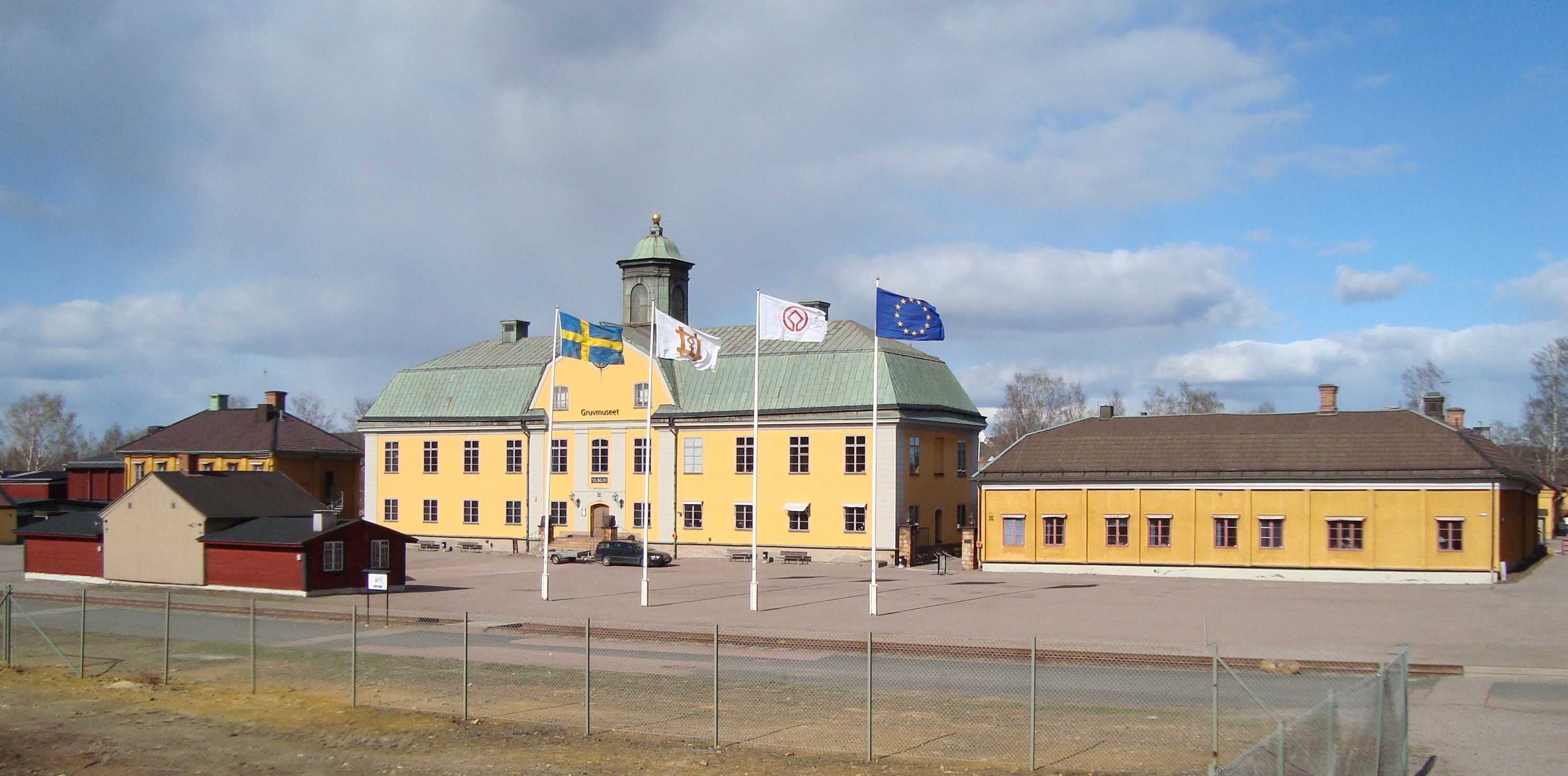 Falu koppargruva. Falun, Sverige